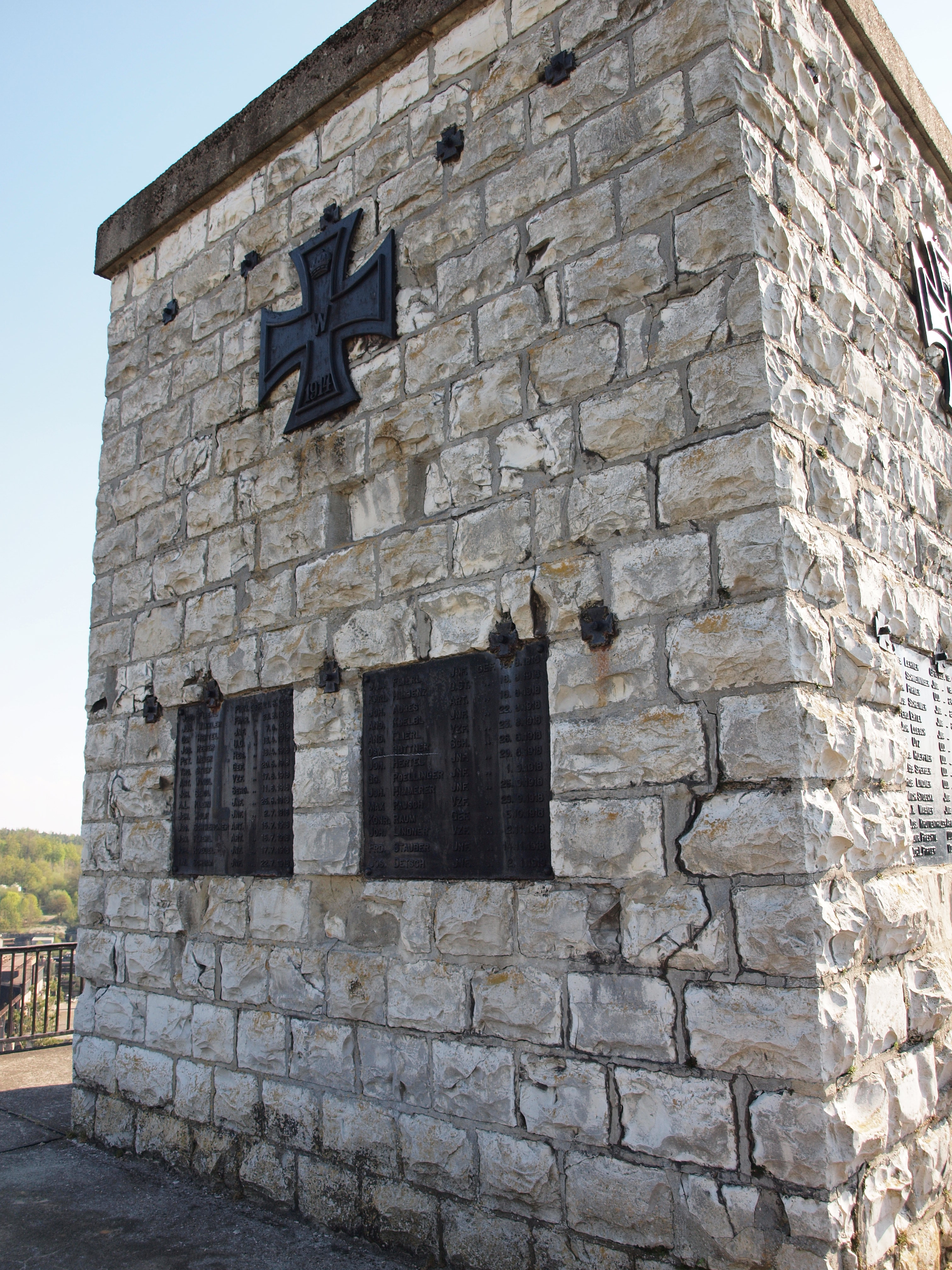 Rosenberg, Schloßberg: Kriegerdenkmal für die Gefallenen des Ersten Weltkriegs auf Burgstall Rosenberg platziert – Detail 1.